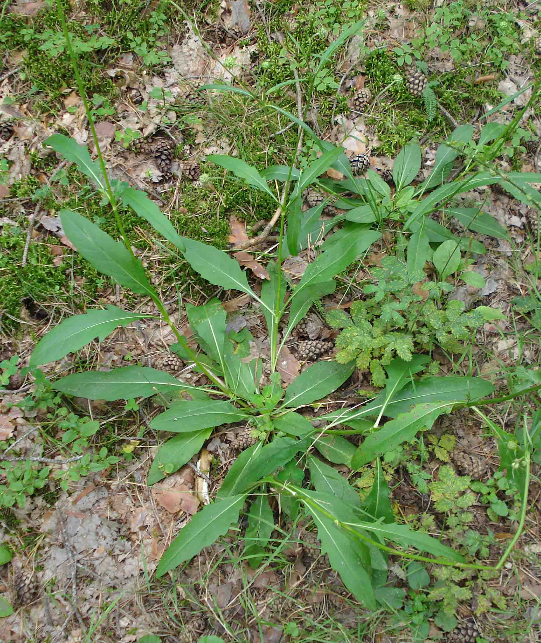 Succisa pratensis (Unterfranken, Germany)